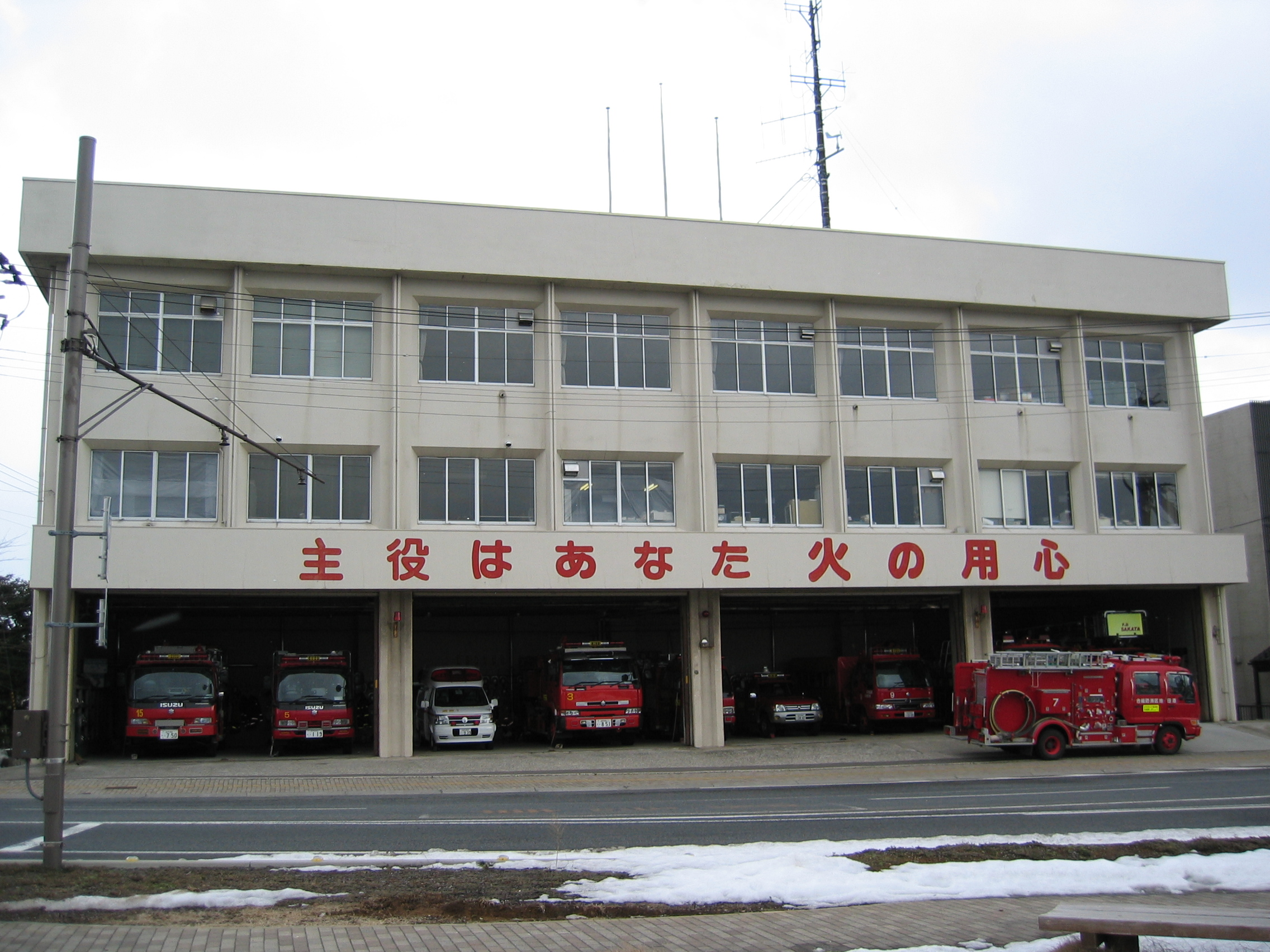 酒田地区広域行政組合（2008年3月31日までは「酒田地区消防組合」）